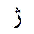 Der persische Buchstabe Zhe in isolierter Form.